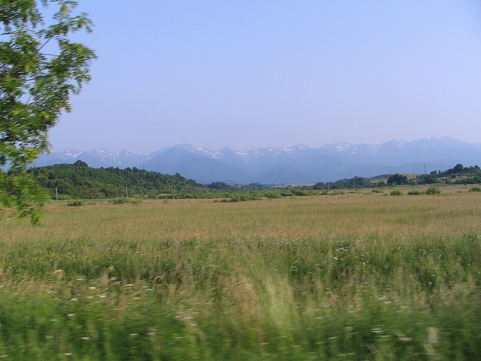 Góry Fogaraskie widziane od północy z drogi nr 1 (E68)